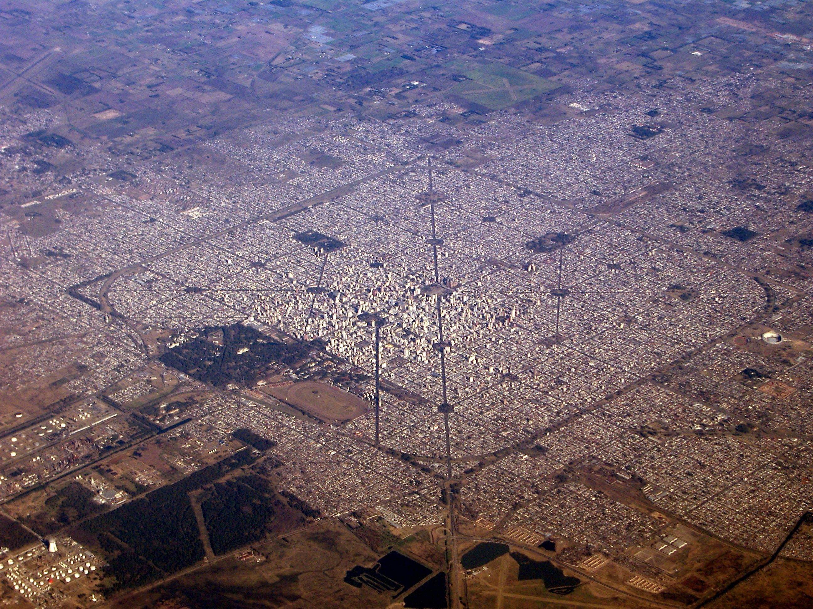 El casco urbano de la ciudad de La Plata, vista desde las alturas.